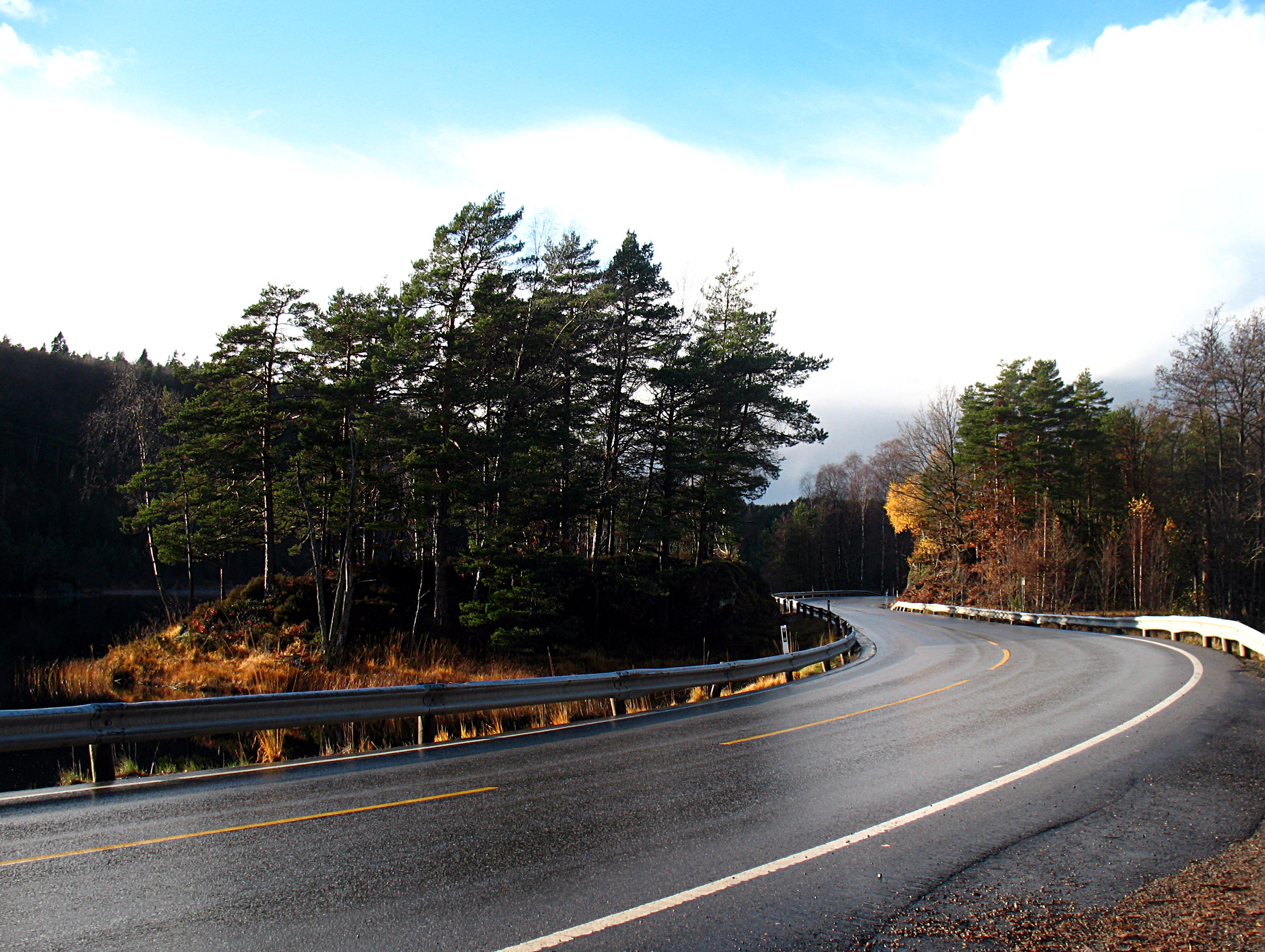 Fylkesvei 453 i Kristiansand kommune, Vest-Agder på Sunde bru mellom Kilen og Farvannet.